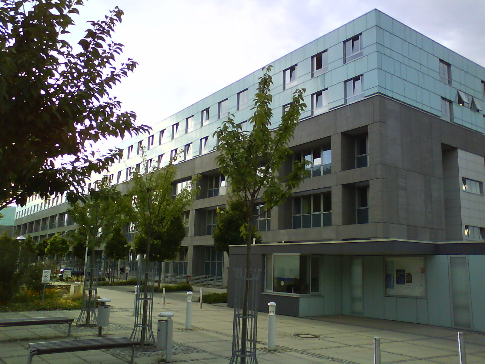 haus 60 a der universitätsklinik magdeburg